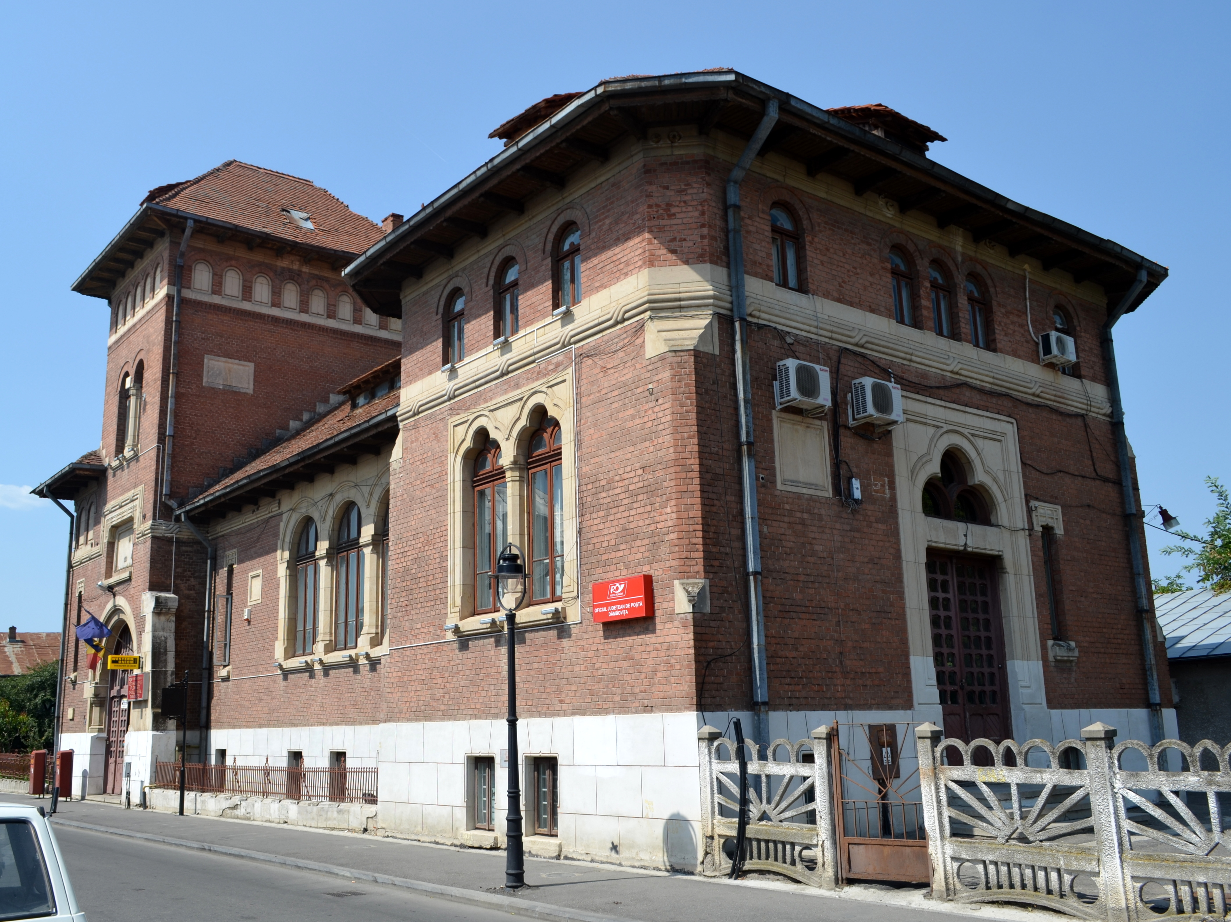 Poșta veche, Str. Doctor Marinoiu nr. 2, Târgoviște